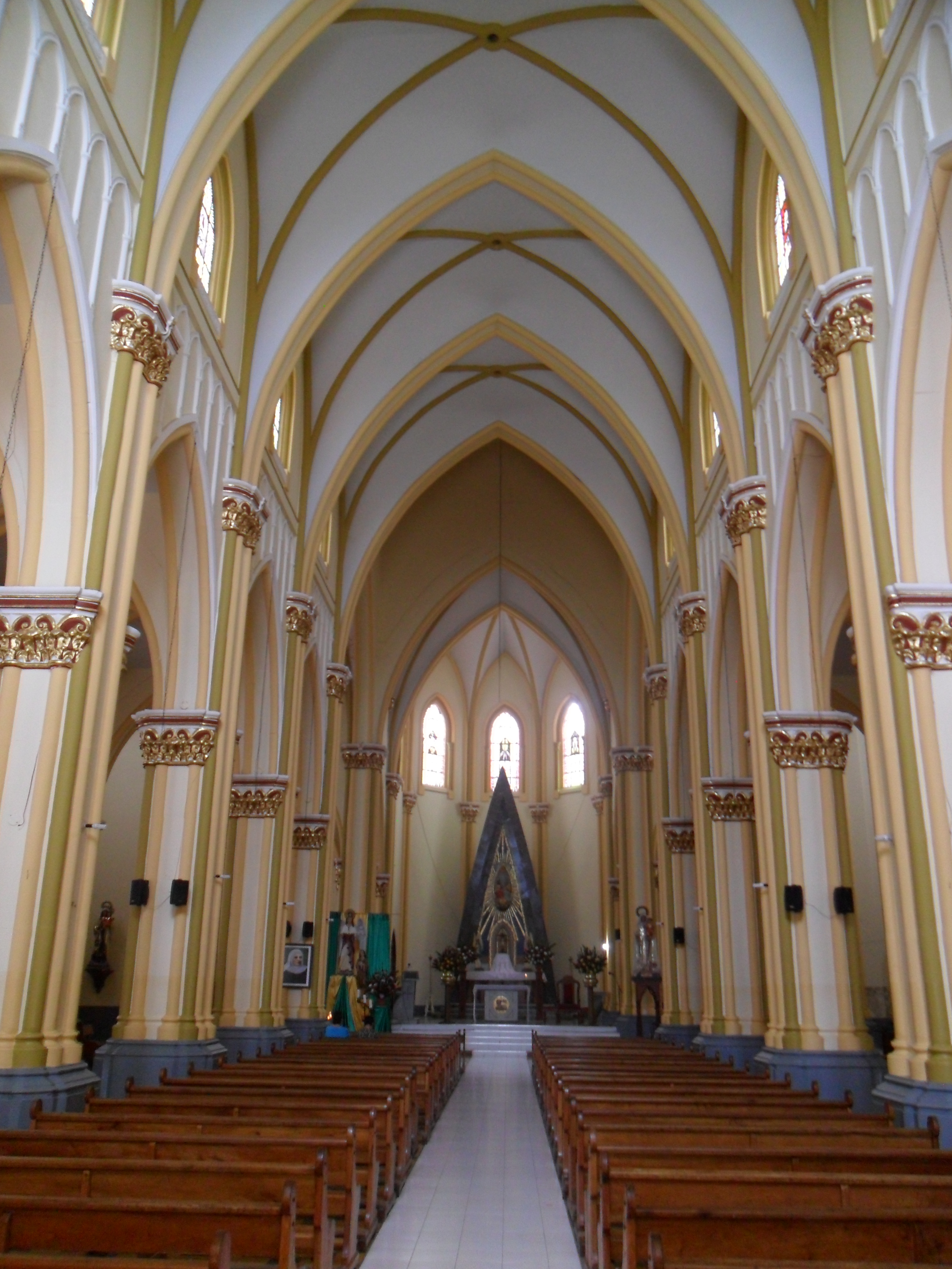 Vista de la nave central de la Iglesia de San Rafael de Betania.